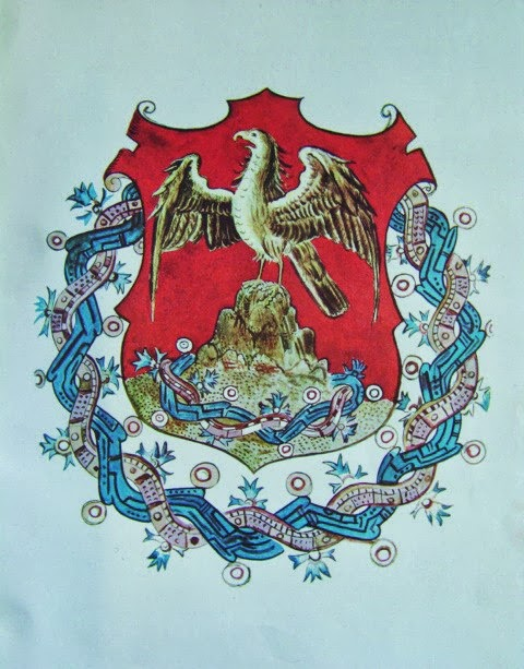 Escudo de tepeaca